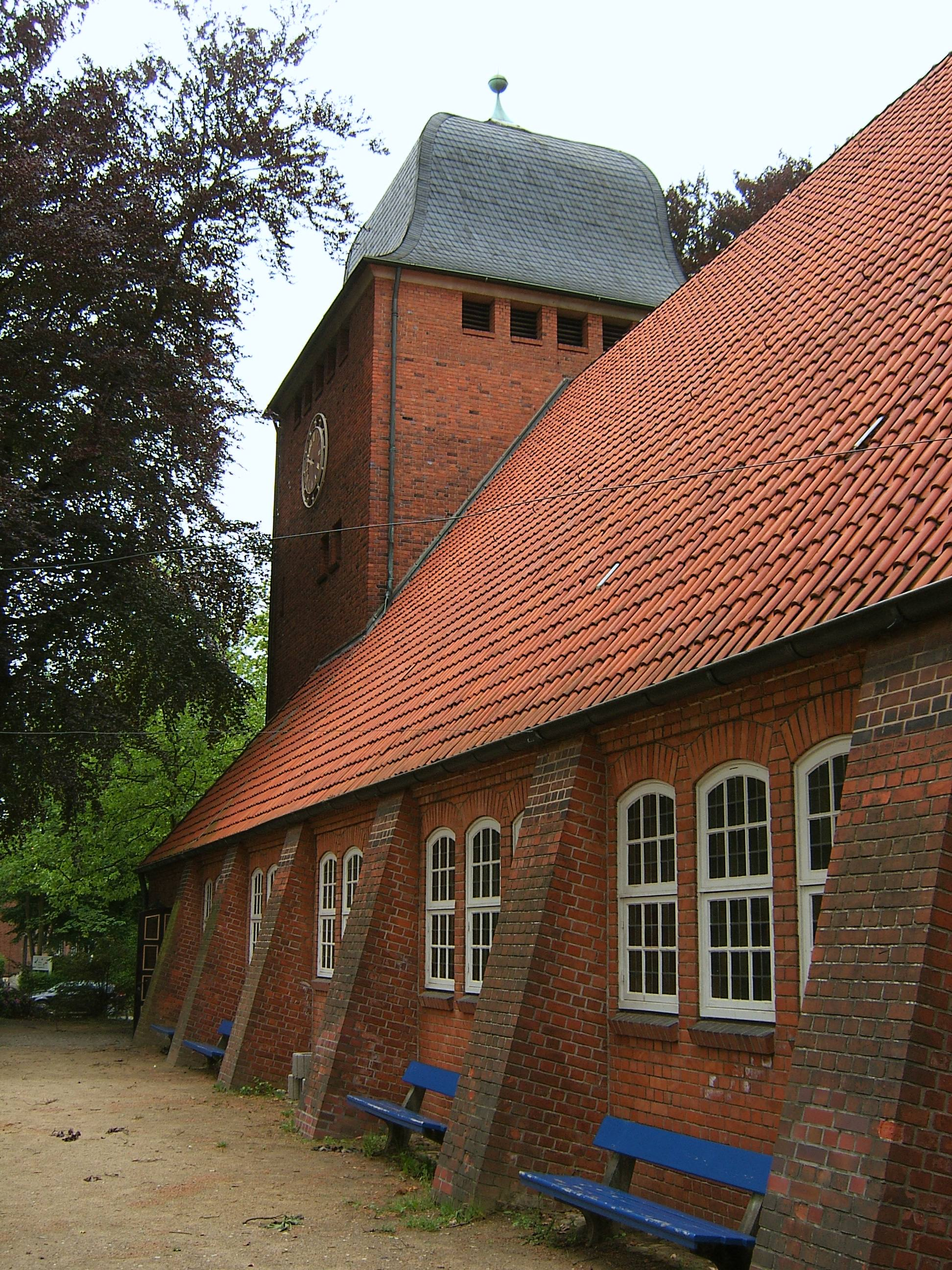 Hamburg, Fuhlsbüttel, St. Lukas